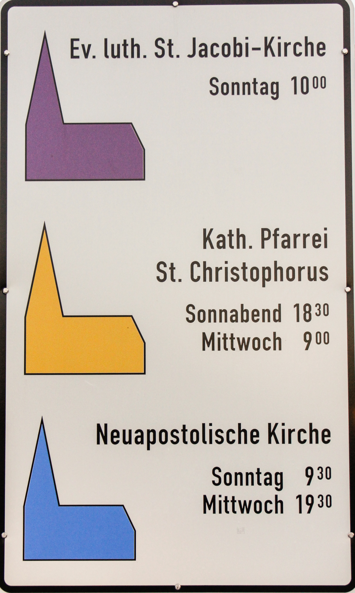 Kirchliche Hinweisschilder mit Angabe der Gottesdienstzeiten in Stolzenau, Niedersachsen, Deutschland. Von oben nach unten: Evangelisch luth. St. Jacobi Gemeinde Kath. Pfarrei St. Christophorus Neuapostolische Kirche